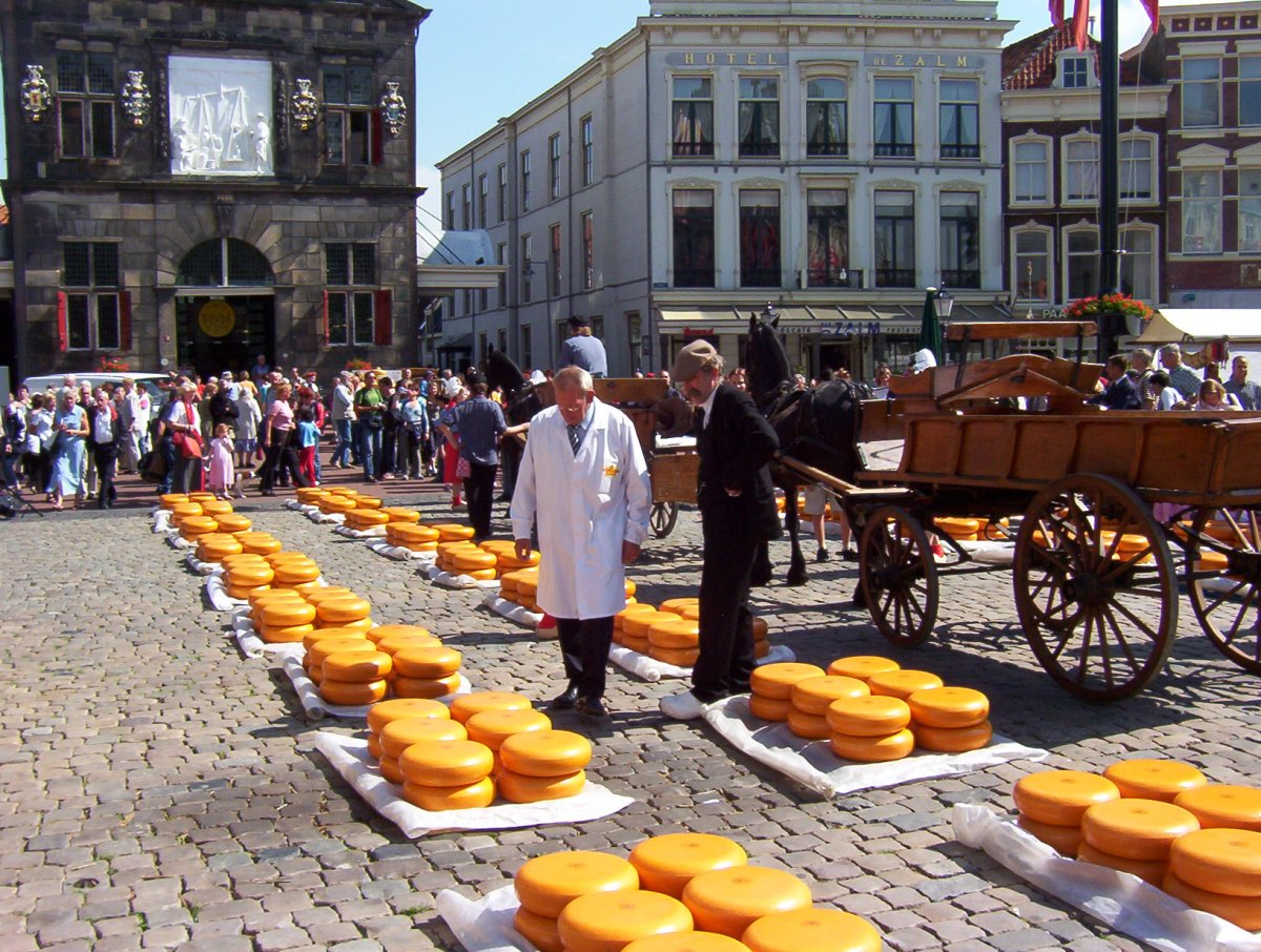 Cheese market in Gouda, Netherlands, 2004 / Goudse kaasmarkt op donderdagochtend 2004